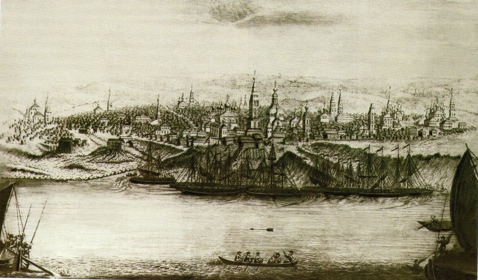 Город Чебоксары.